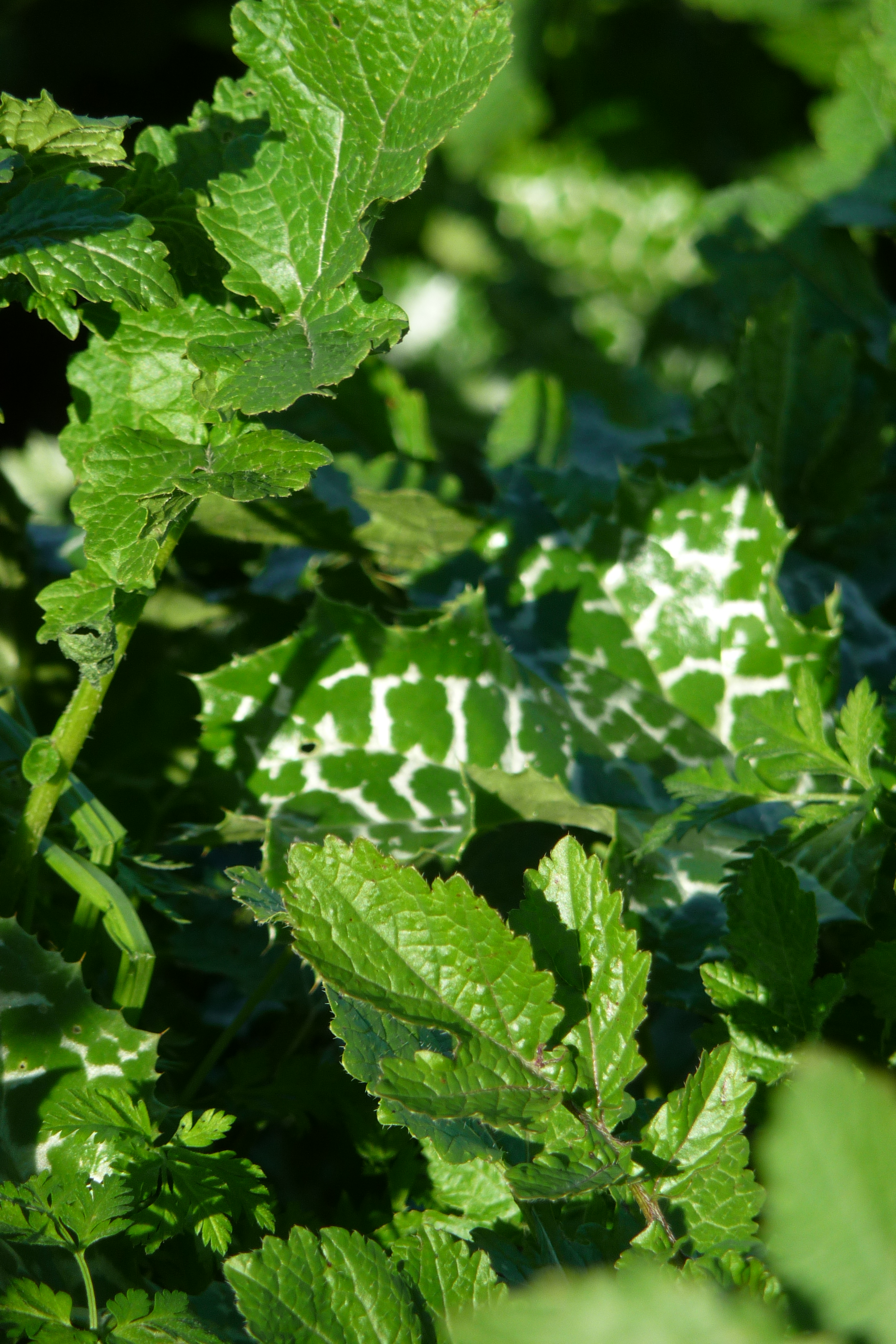 שמורת טבע בעמק זבולון, מזרחית לקריית ביאליק. השמורה כוללת הן את המעיינות והביצות המהווים את מקורו של נחל נעמן והן את האתר הארכאולוגי תל אפק. השמורה הוכרזה ב-1979 והיא משתרעת על פני 660 דונם. ב-1996 הוכרה השמורה כ"אתר רמסר" בהתאם לאמנת רמסר לשימור ולפיתוח בר-קיימא של בתי גידול לחים.